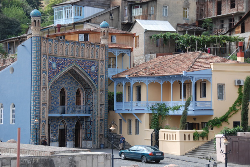 Kaupungin vanhinta osaa: kylpylä Abanotubanin kaupunginosassa.